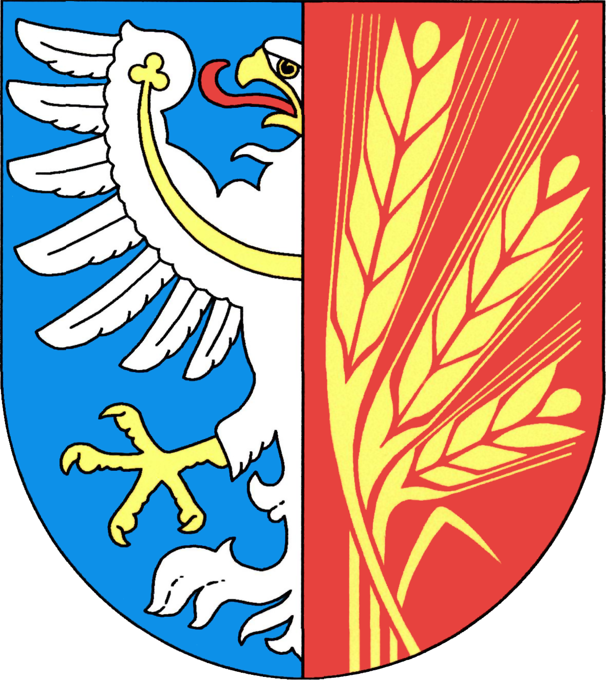 Znak obce Kounice